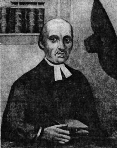 Valentin Bernard Jestřábský, kazatel a barokní spisovatel